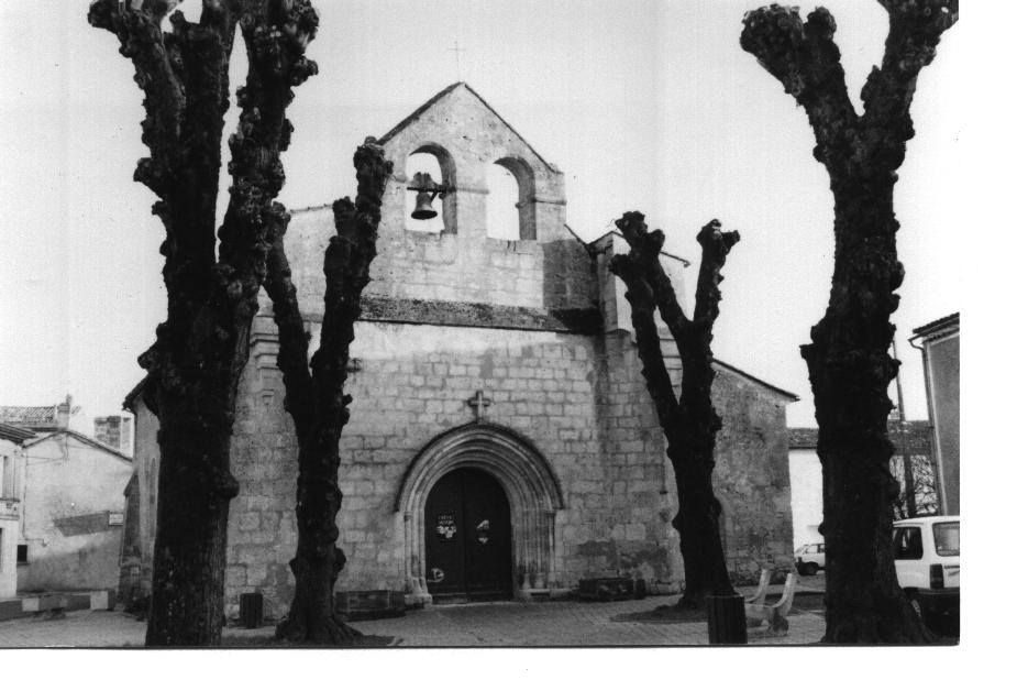 Eglise de saint Antoine